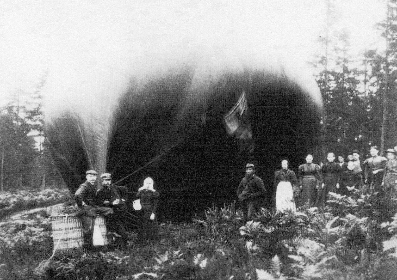 Oscar Halldin (vänster) med aeronauten Francesco Cetti framför sin ballong "Fritjof Nansen" efter landningen vid Lerum 1898